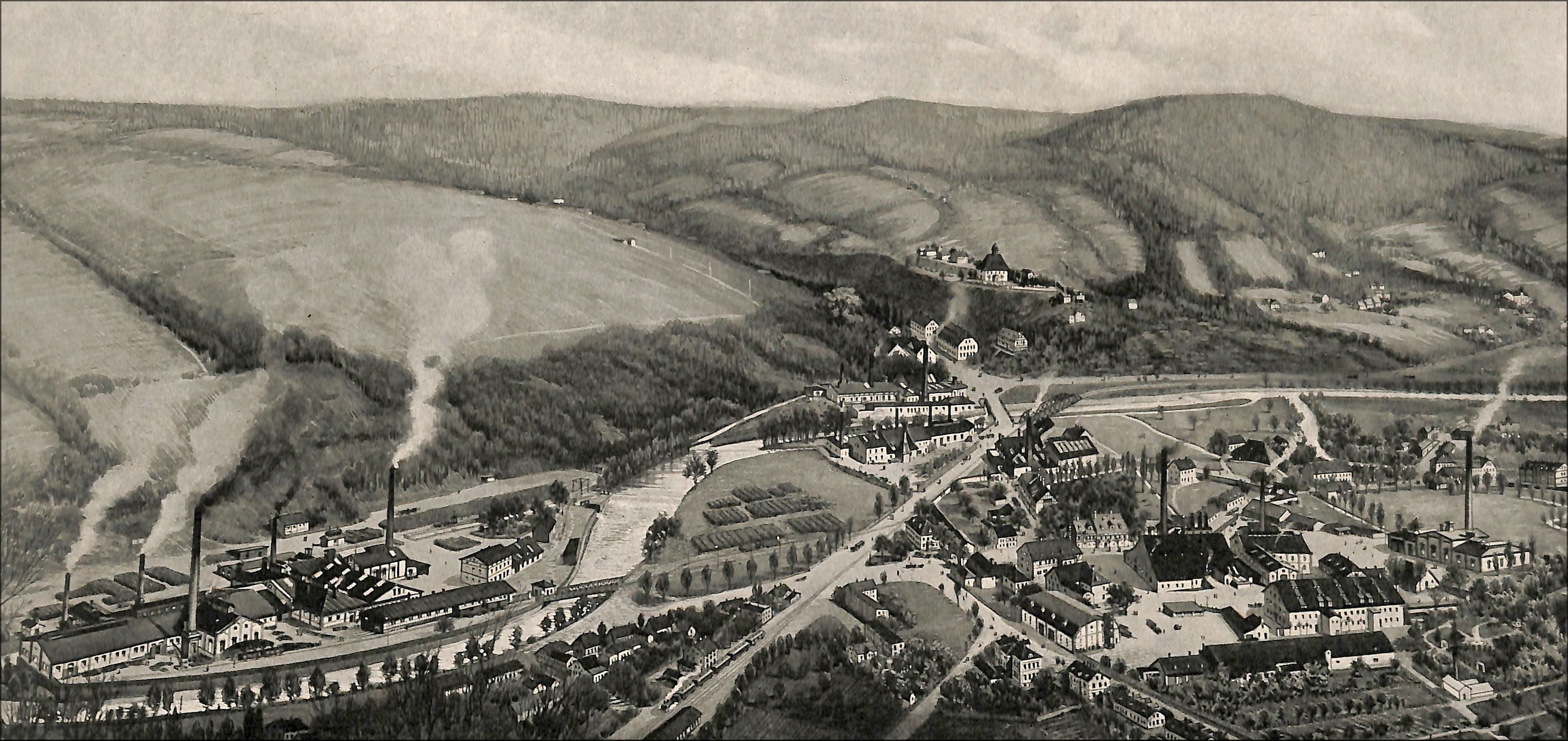 Ansicht der Ortslage Grünthal im Jahre 1912.